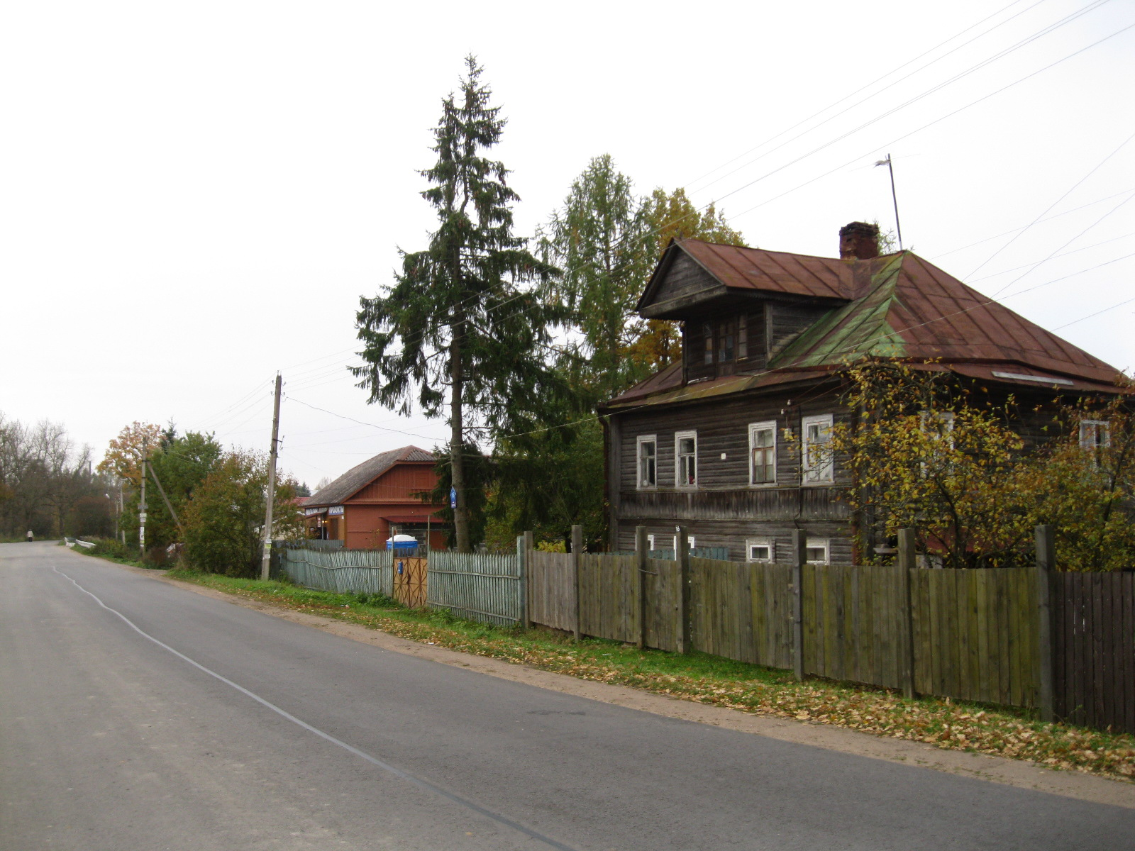 Советская улица. Лисино-Корпус, Тосненский район, Ленинградская область, Россия.